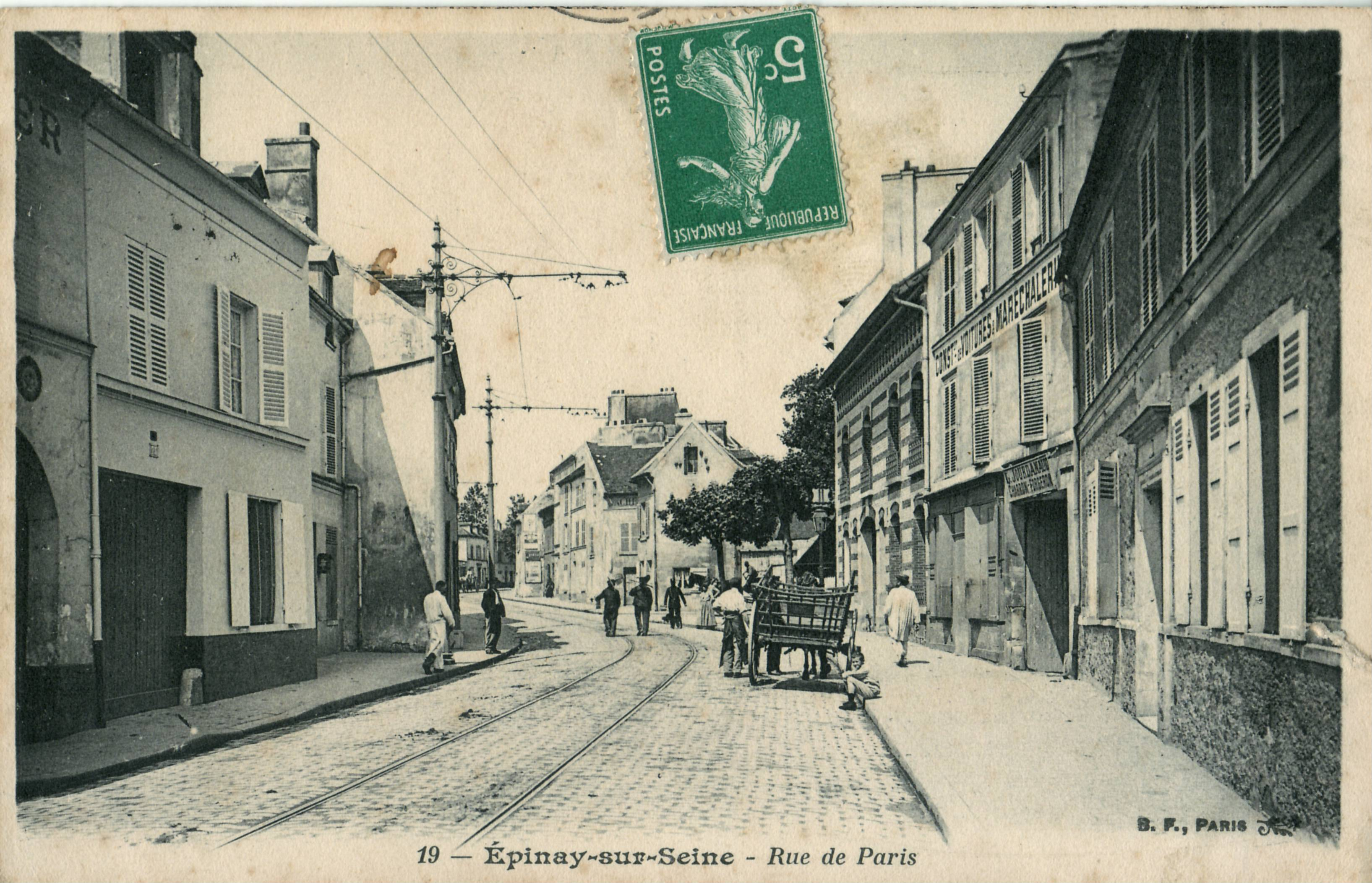 Carte postale ancienne éditée par BF à Parisn n°19 :ÉPINAY-SUR-SEINE - Rue de Paris